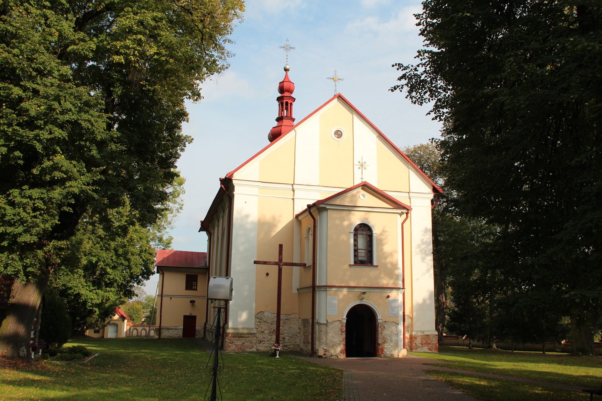 Krzczonów-Wójtostwo - rzymskokatolicki kościół parafialny p.w. Wniebowzięcia NMP, XVII, XIX, XX